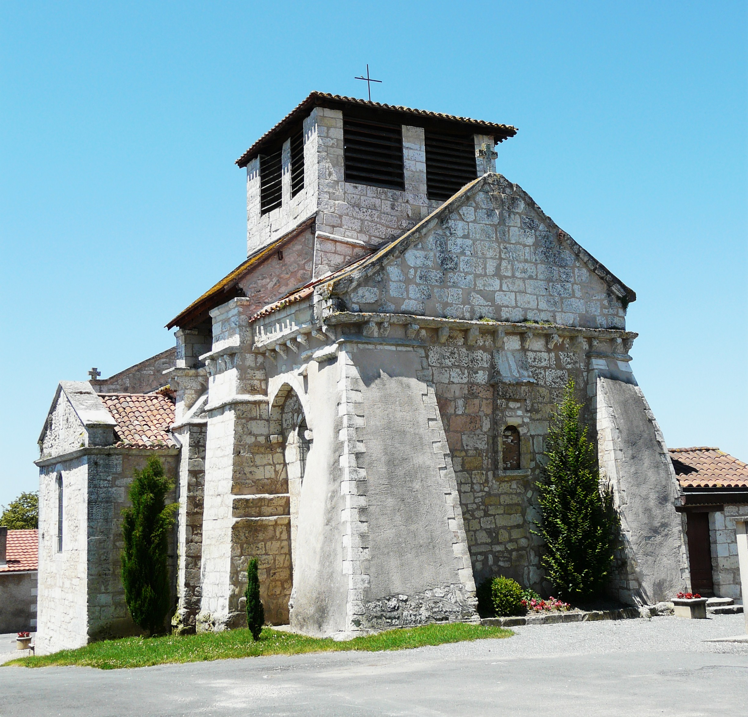 Église Saint-Eumache vue du sud-est, Cornille, Dordogne, France